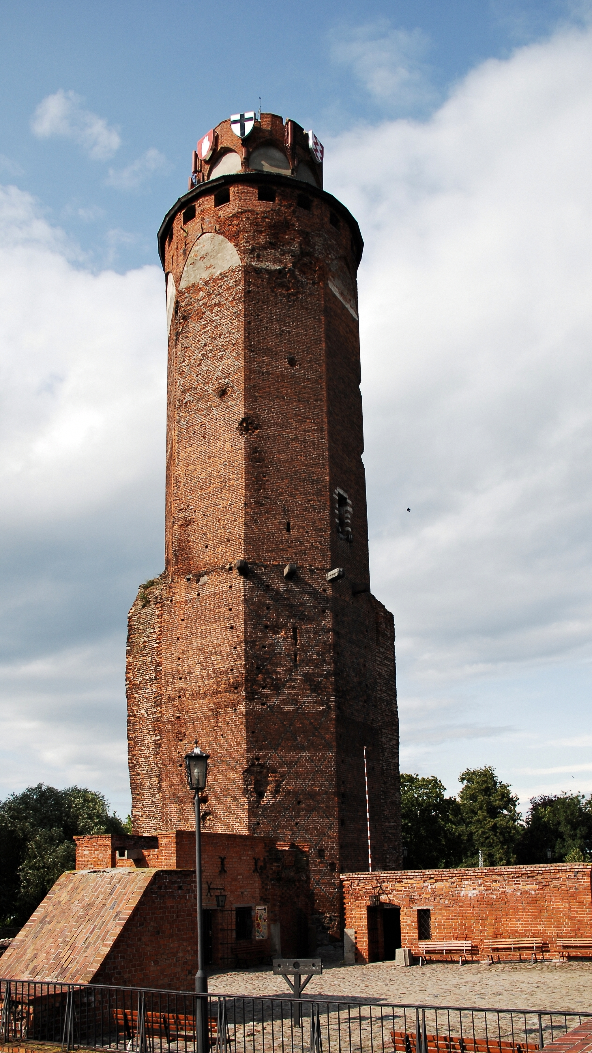 Wieża zamkowa w Brodnicy.